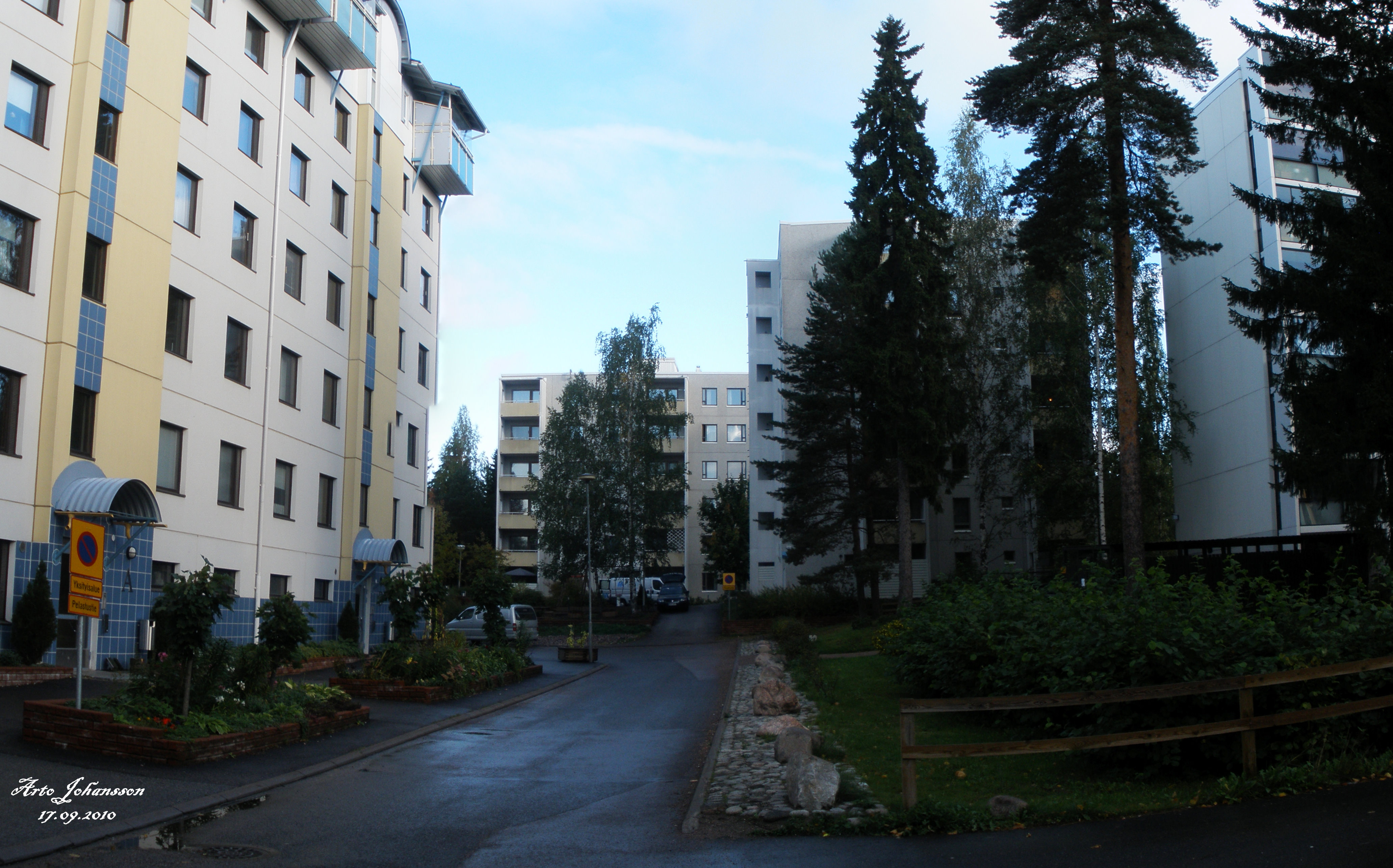 Jamppa...Haltianpolku